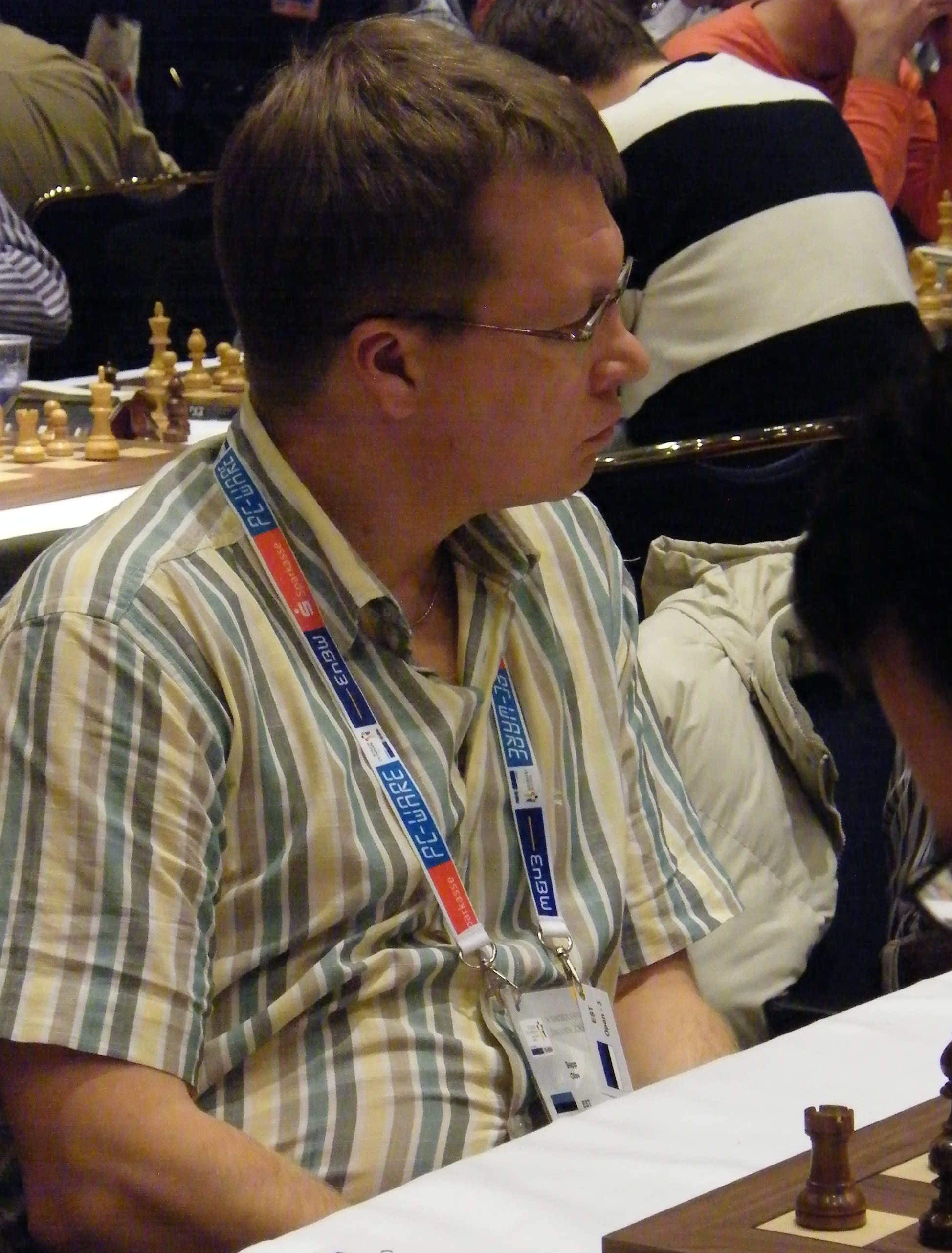 IM Olav Sepp bei der Schacholympiade 2008 in Dresden